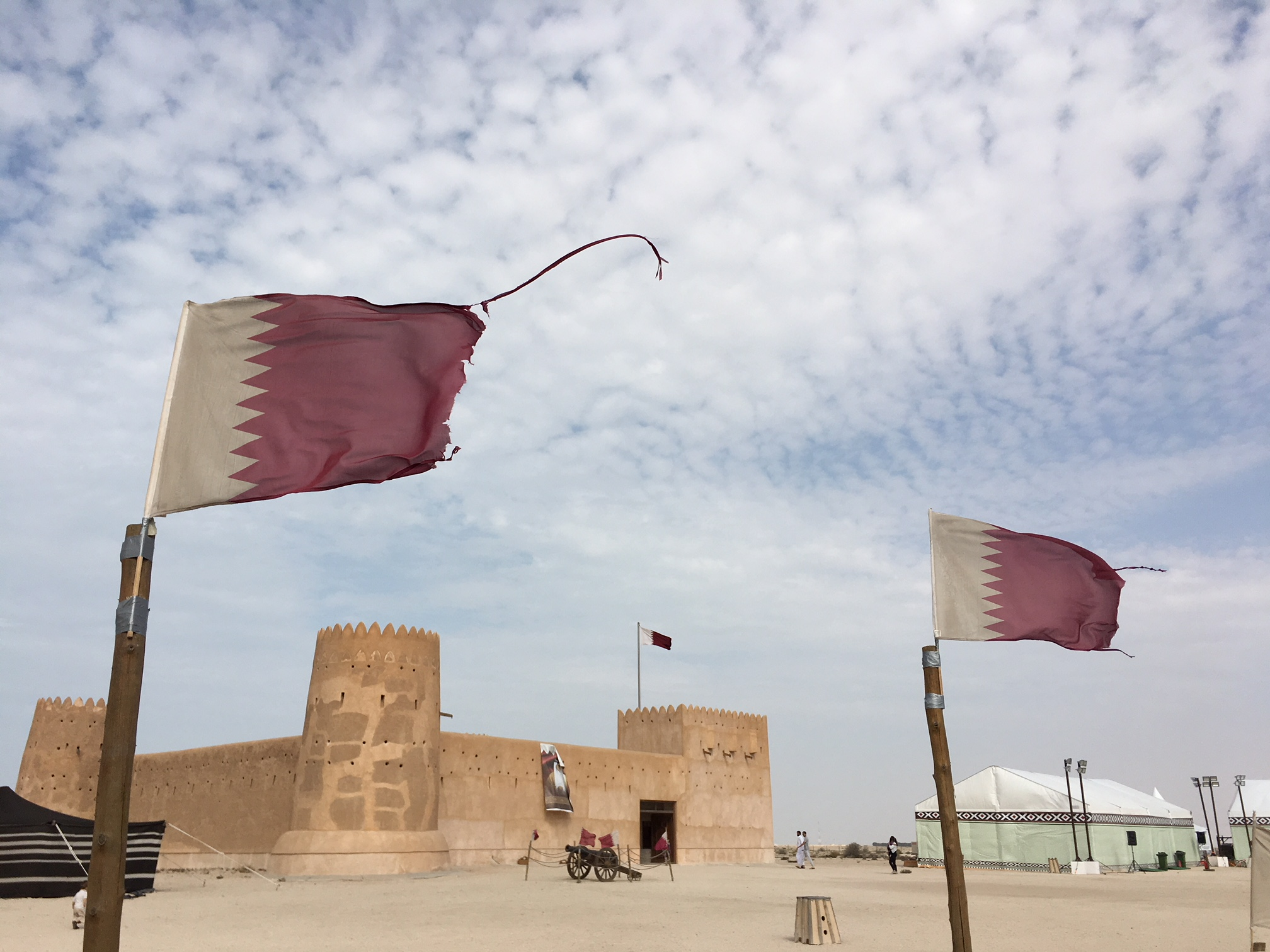 قلعة الزبارة من تصوير عبير جابر